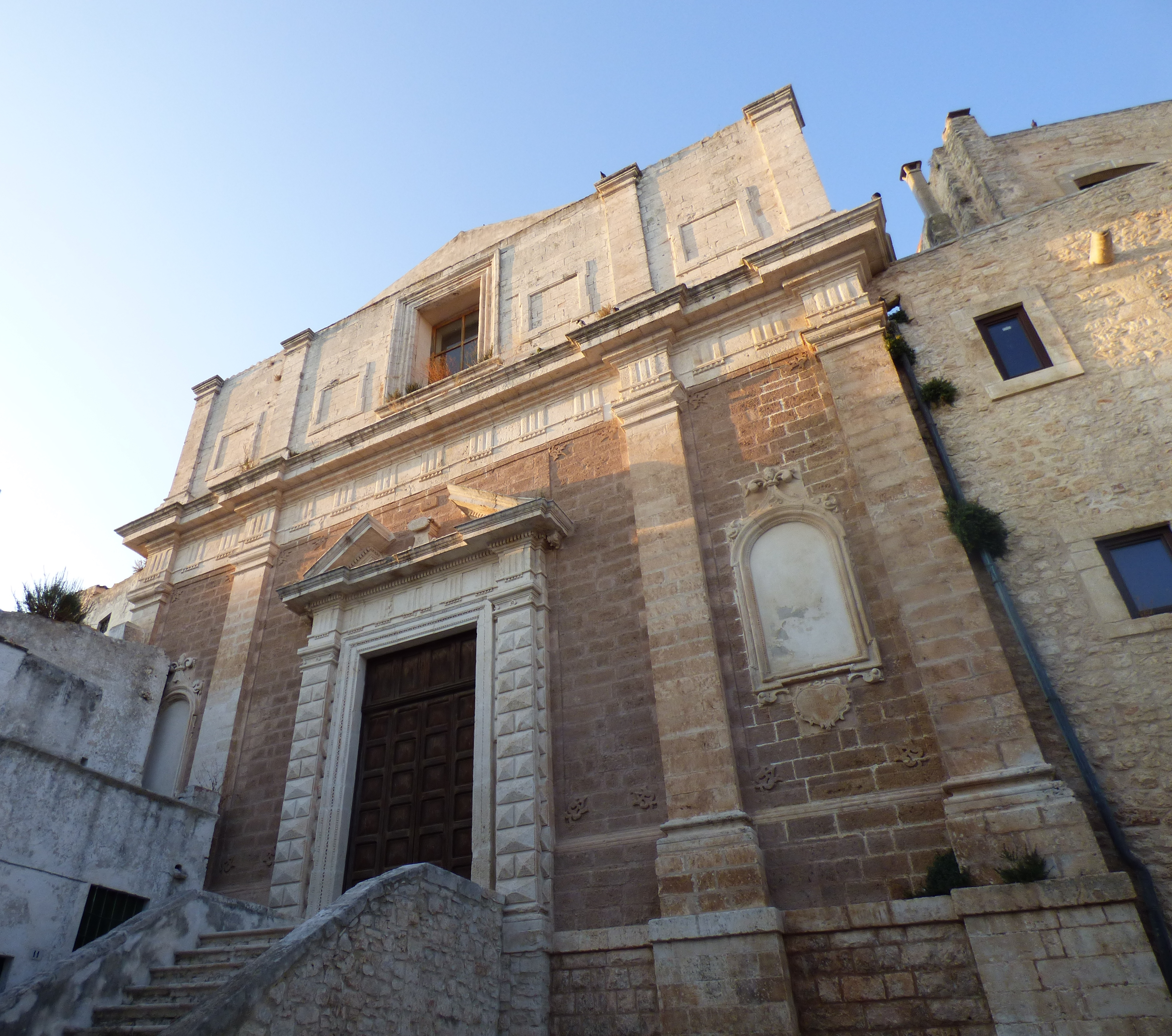 Facciata della Chiesa di San Domenico di Ceglie Messapica.